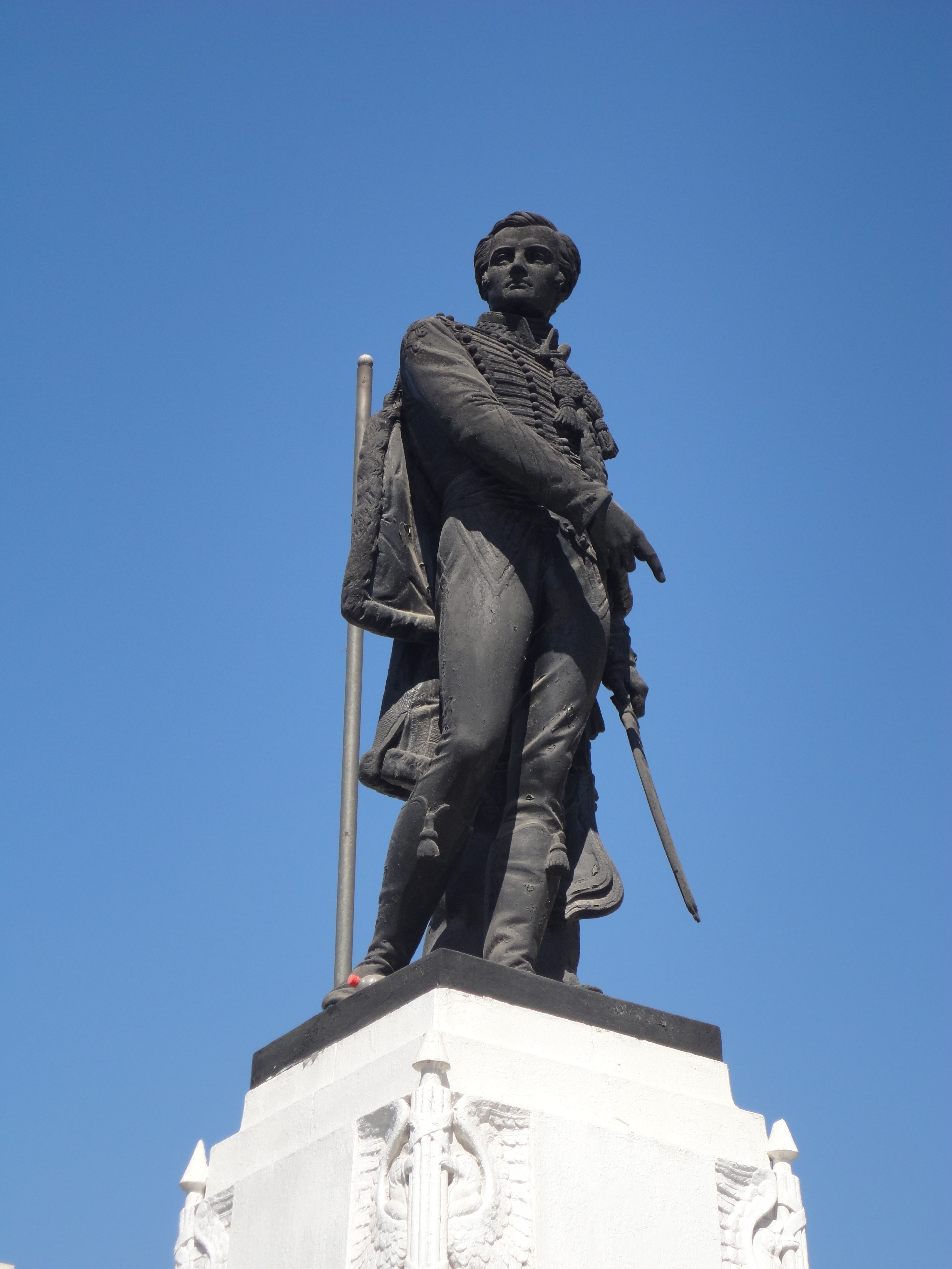 Estatua de José Miguel Carrera en la Gran Avenida que lleva su nombre en la comuna de San Miguel.